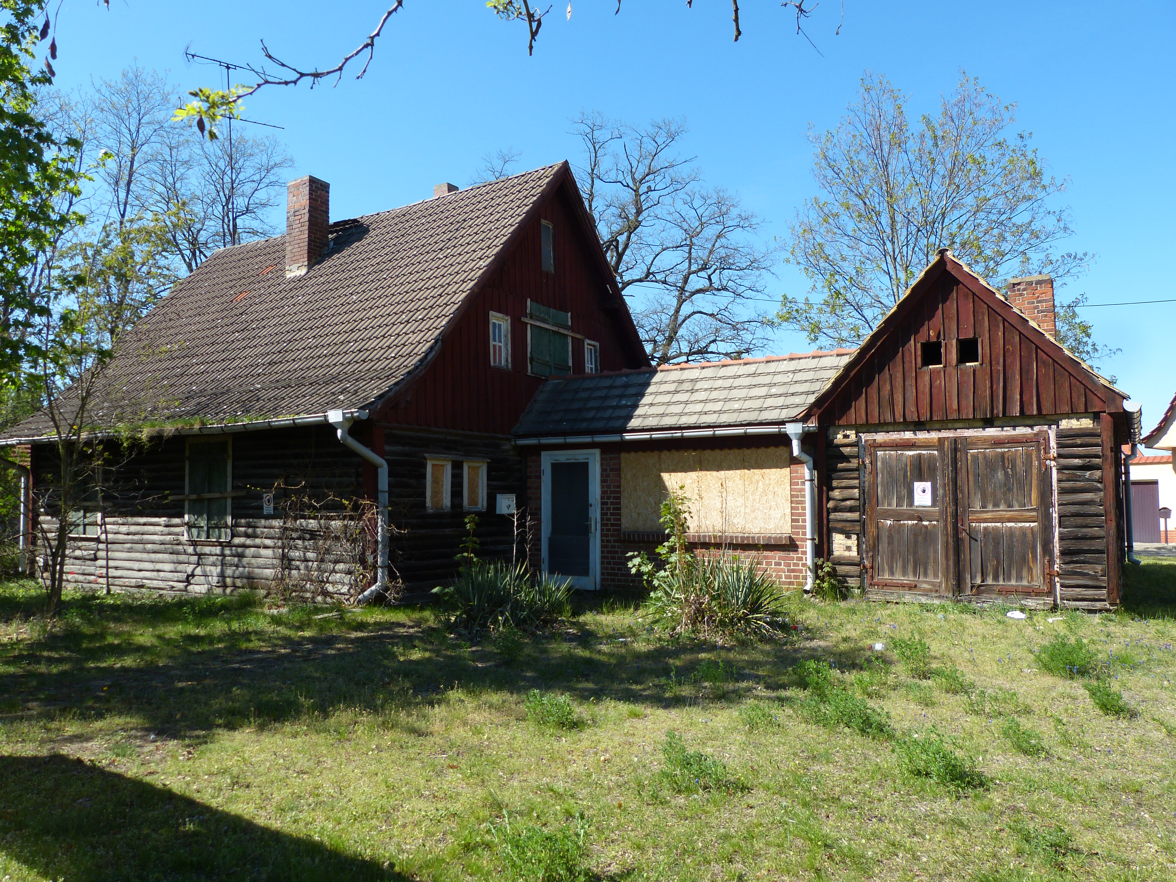 Zschornewitz, Blockbohlenhaus, um 1915 in Gräfenhainichen